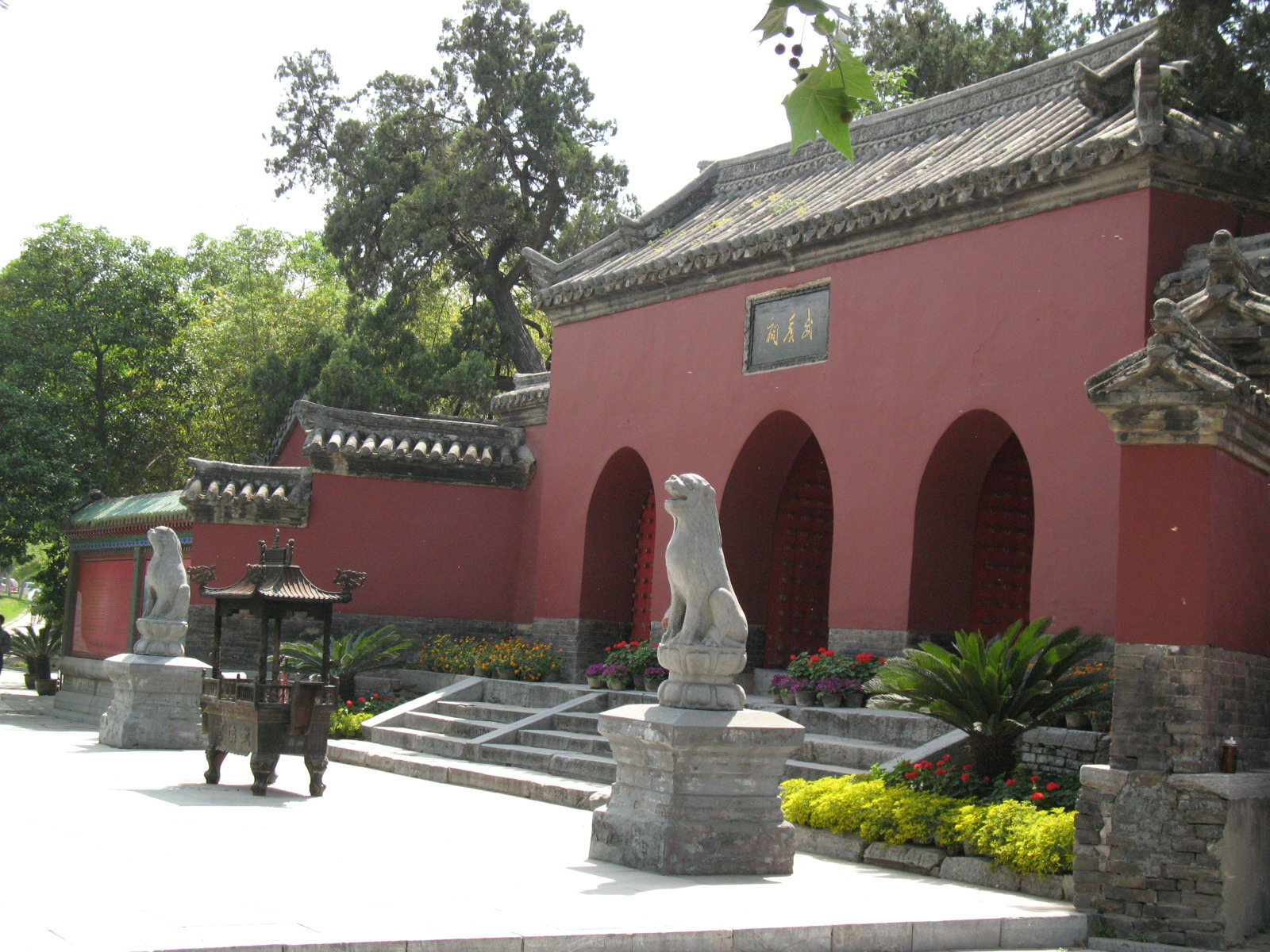 Nanyang Memorial Temple to Wuhou 河南南阳武侯祠